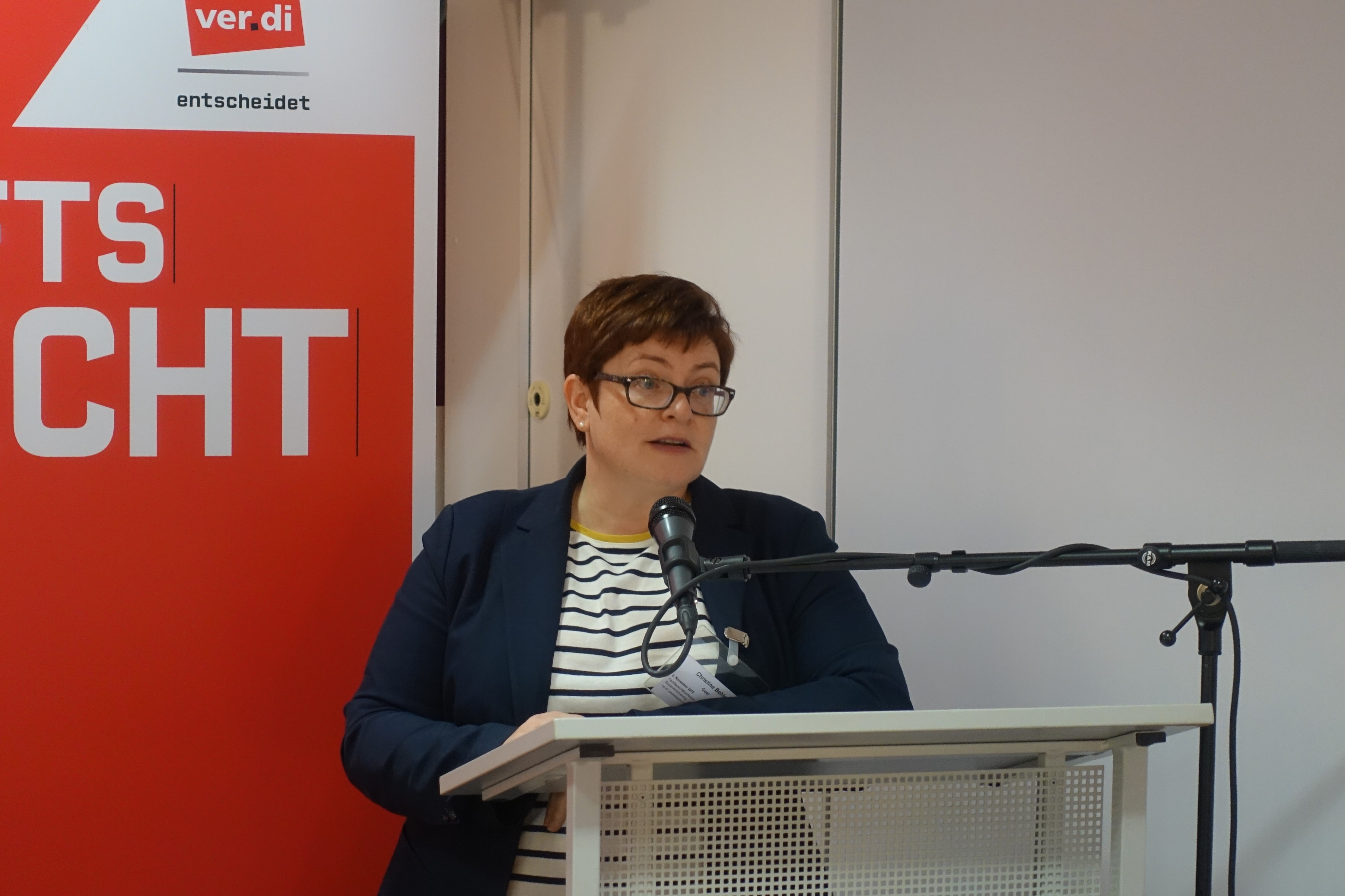 Christine Behle, Bundesvorstandsmitlied der Gewerkschaft ver.di, bei einer ver.di-Konferenz am 2.11.2018 in Hamburg